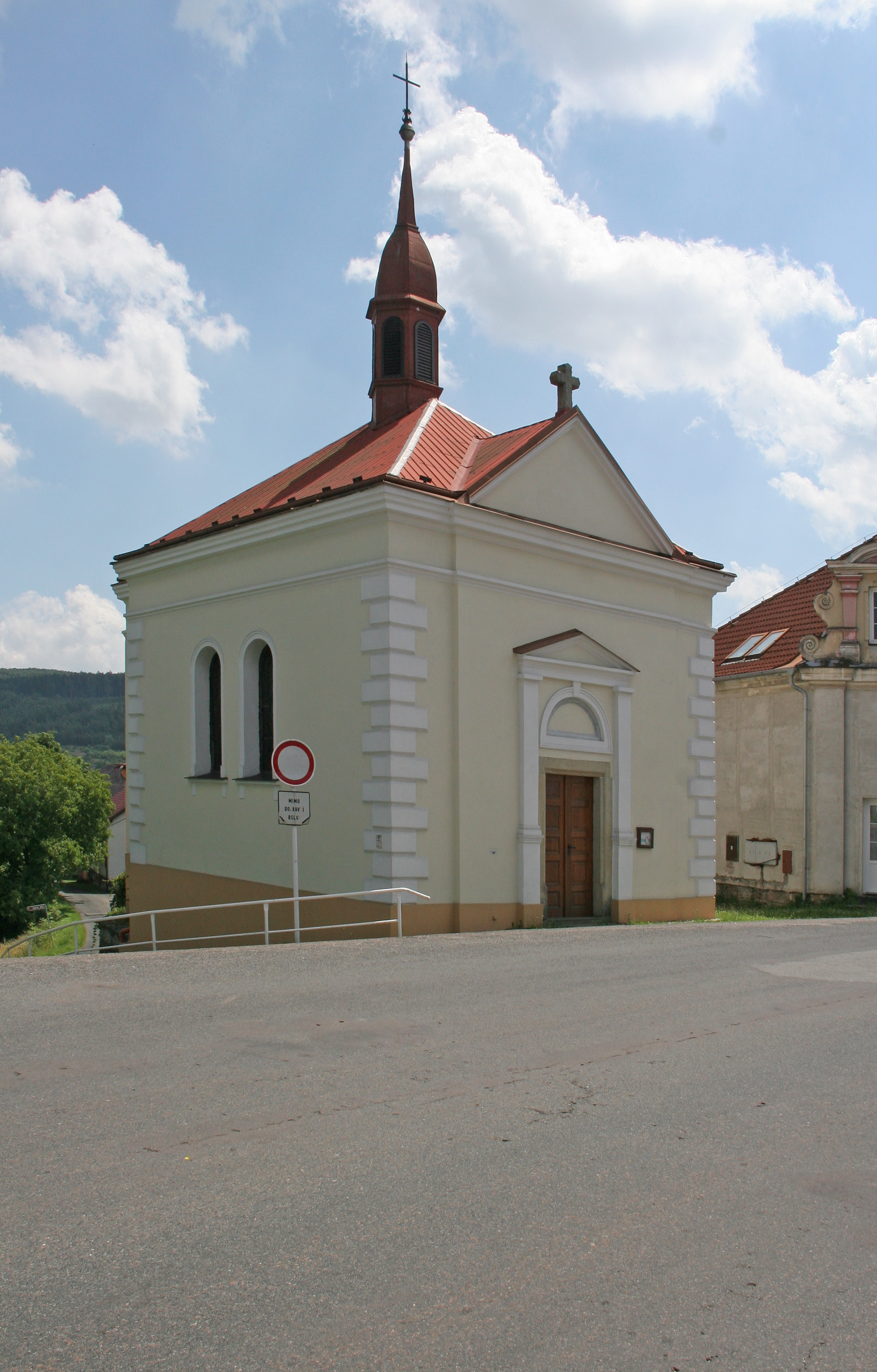 Prachovice kaple Nanebevzetí Panny Marie